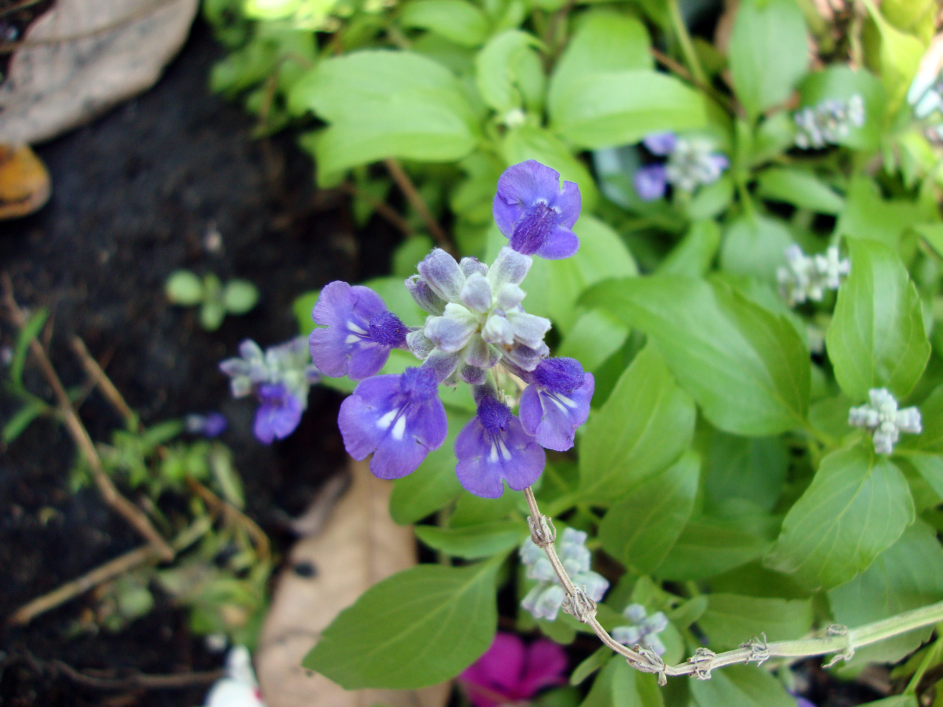 Salvia farinacea Benth., 1833Tiếng Việt: Cửu thảo bột